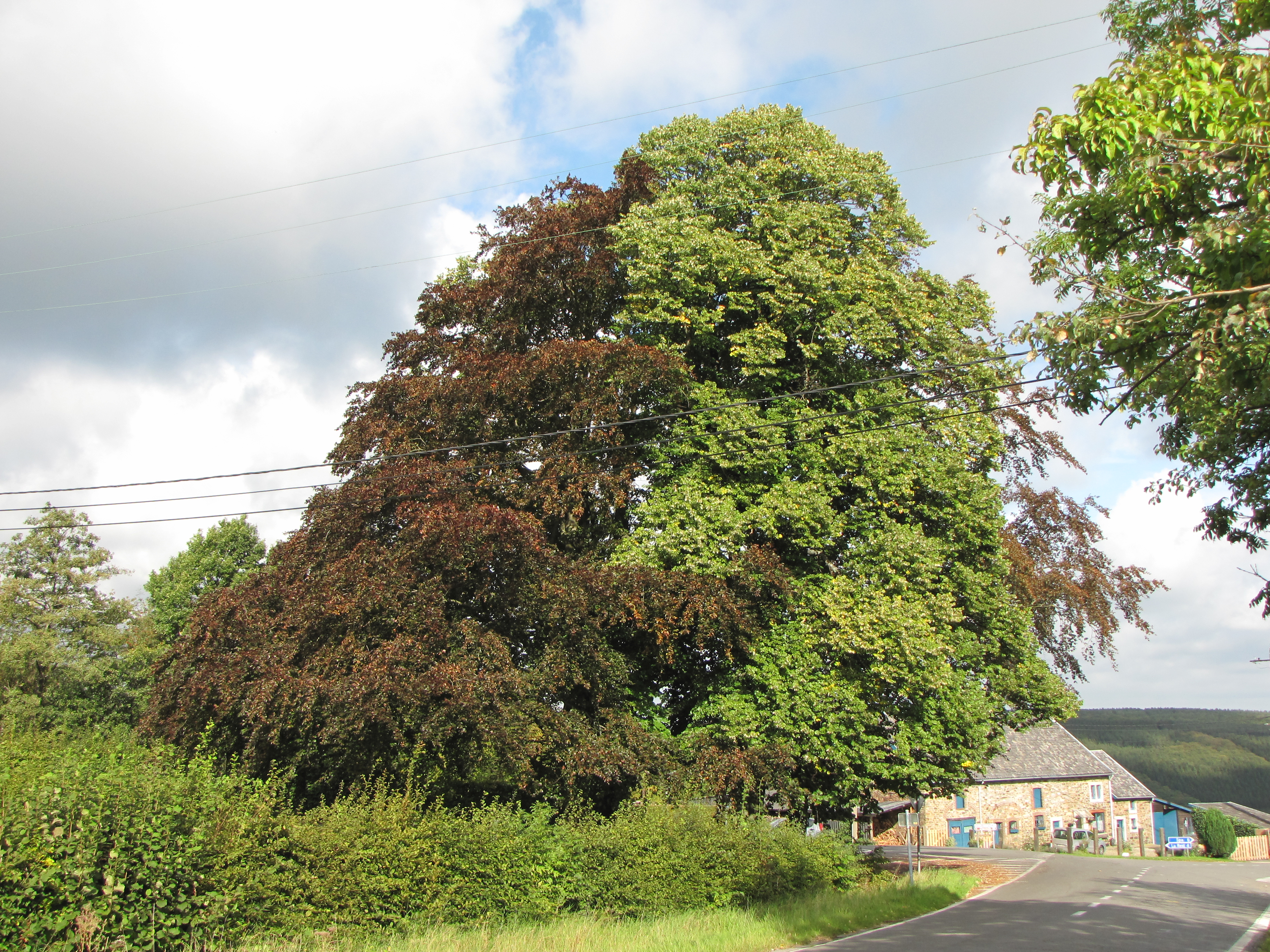 Ilot de hêtres remarquables entourant un monument aux morts dans le Hameau de Basse Desnié (commune de Theux)